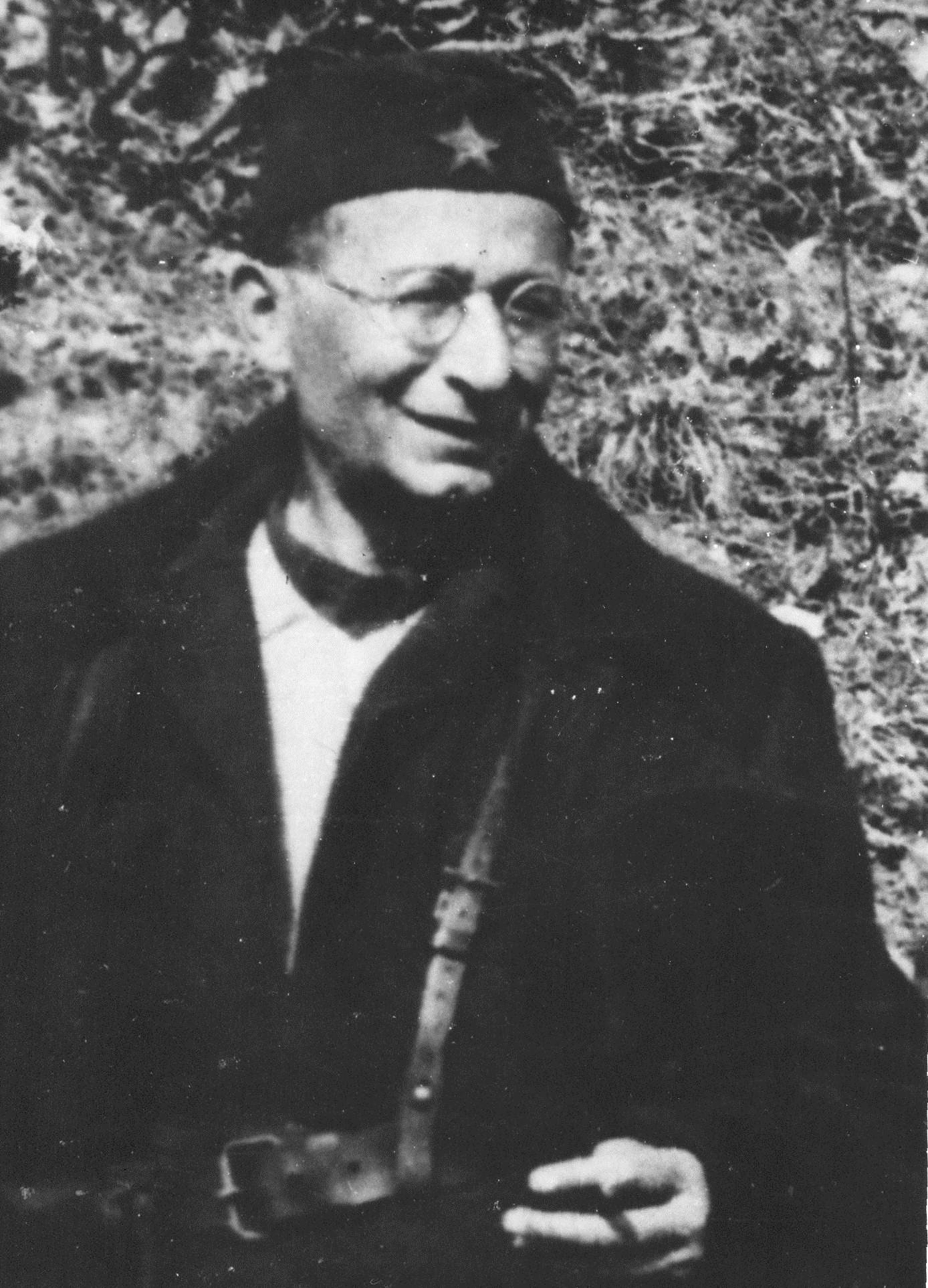 Sima Milošević (1896 — 1943), lekar, učesnik Narodnooslobodilačke borbe i član Izvršnog odbora AVNOJ-a.